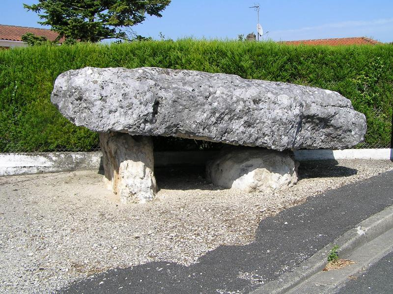 Dolmen de Châteaubernard, près de Cognac, Charente, France